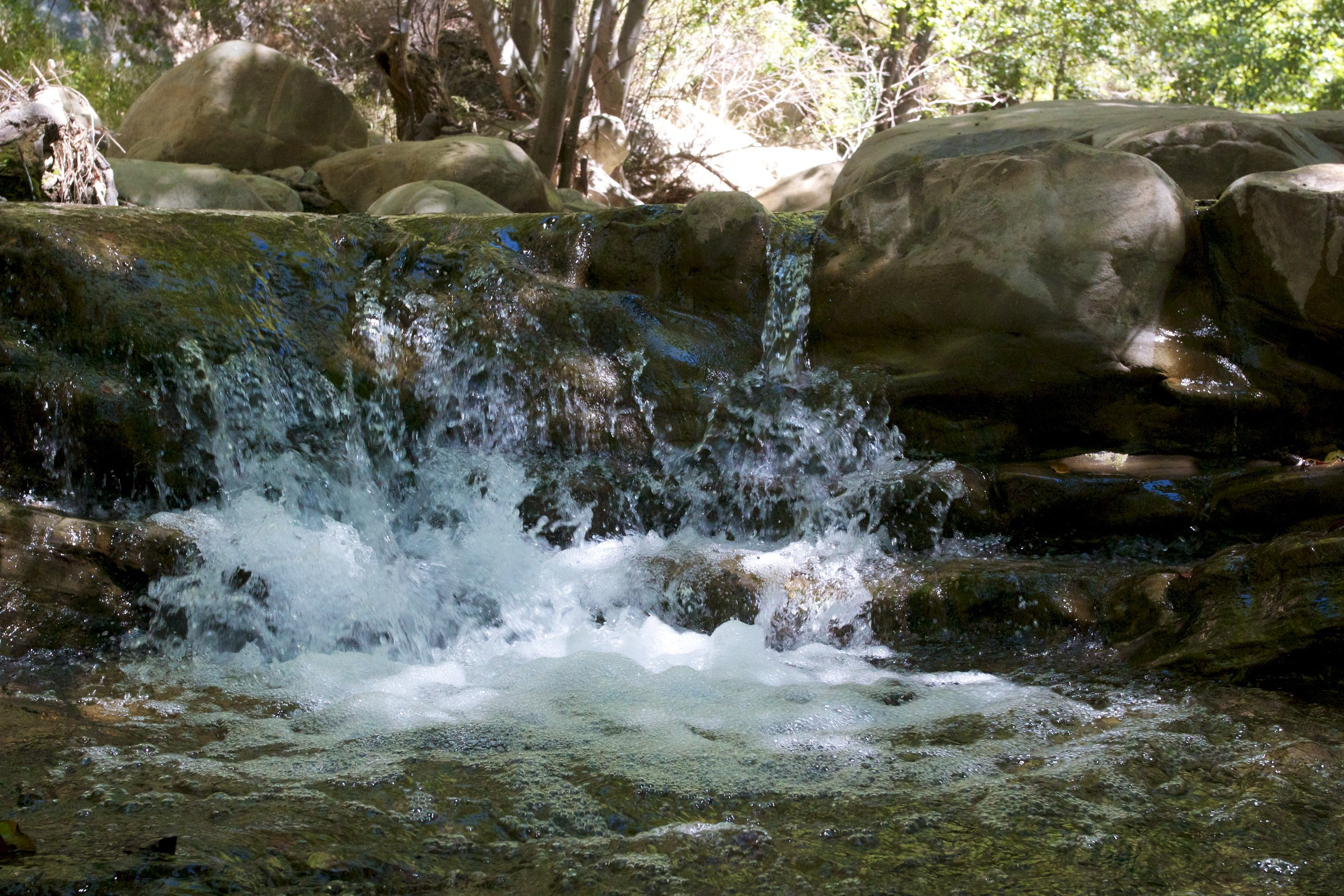 Matilija Falls